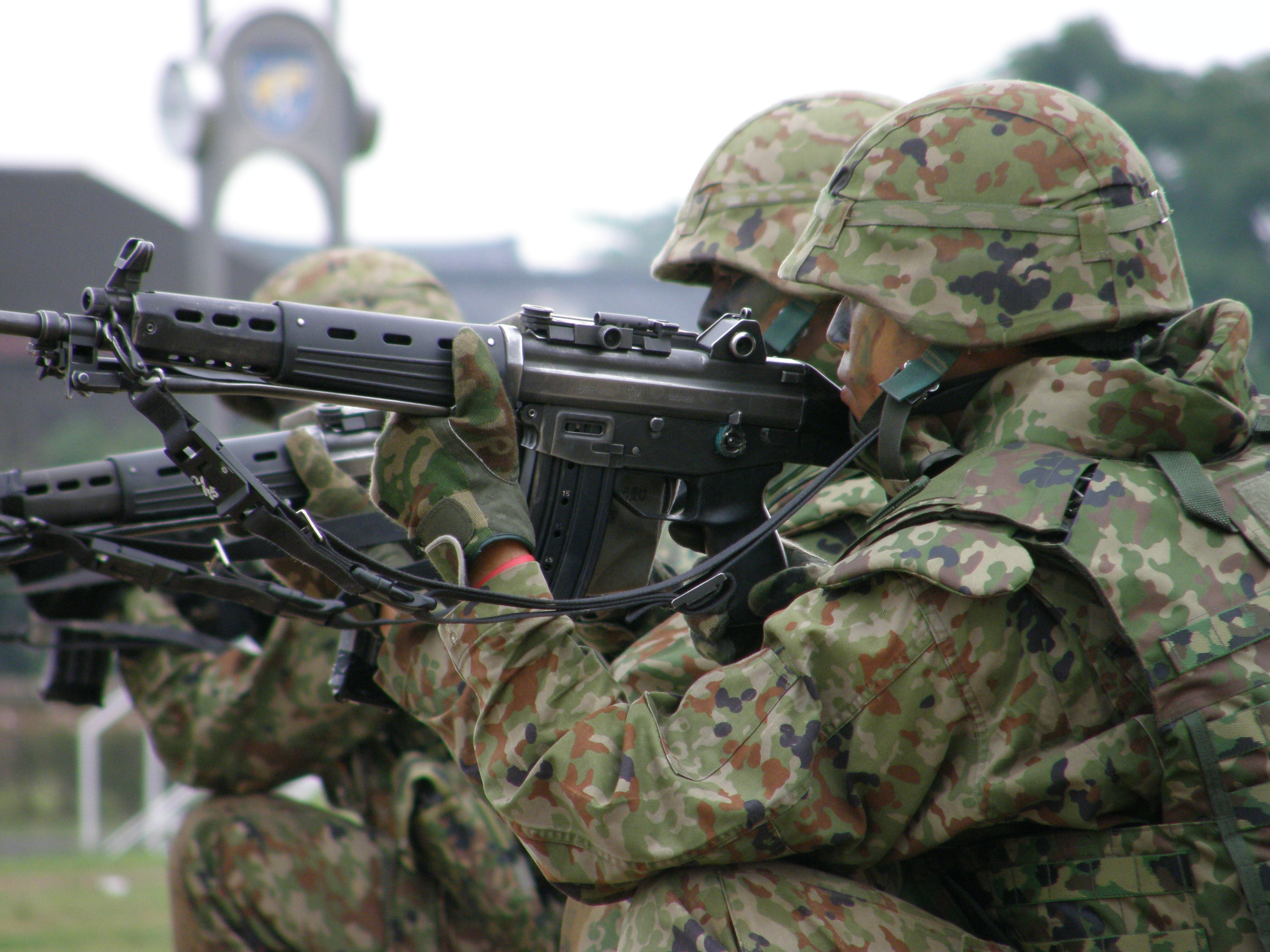 サーチングする2中隊員